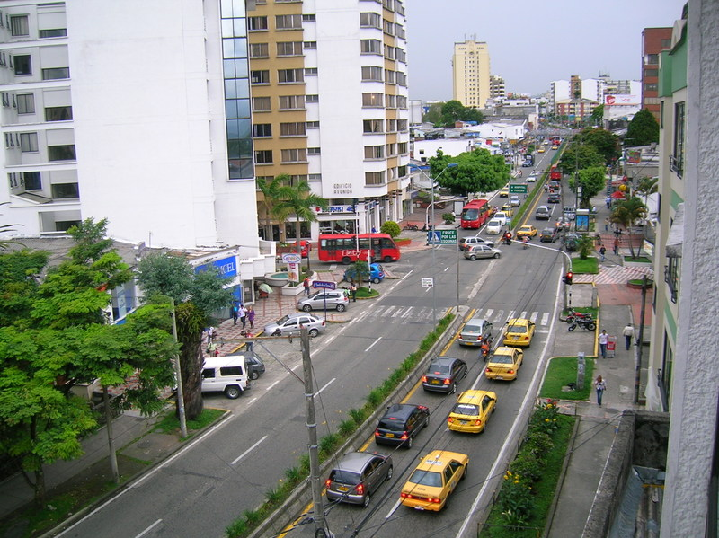 avenida bolivar.jpg